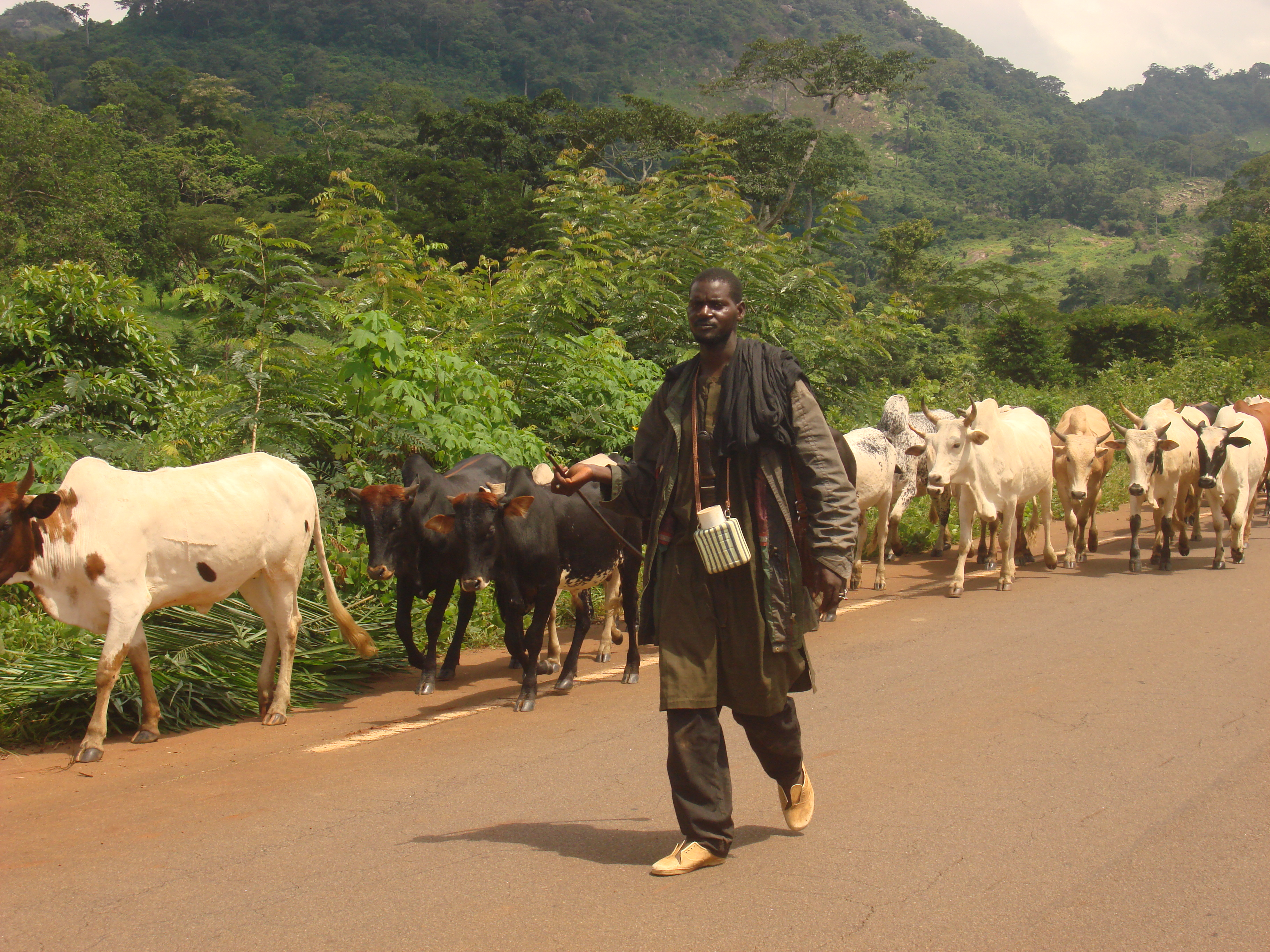 Bouvier conduisant un troupeau sur la route nationale Man-Touba en Côte d'Ivoire.